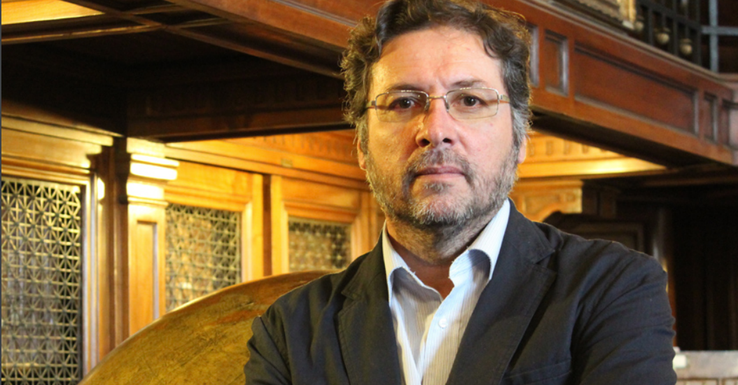 Fotografía de Rafael Sagredo Baeza